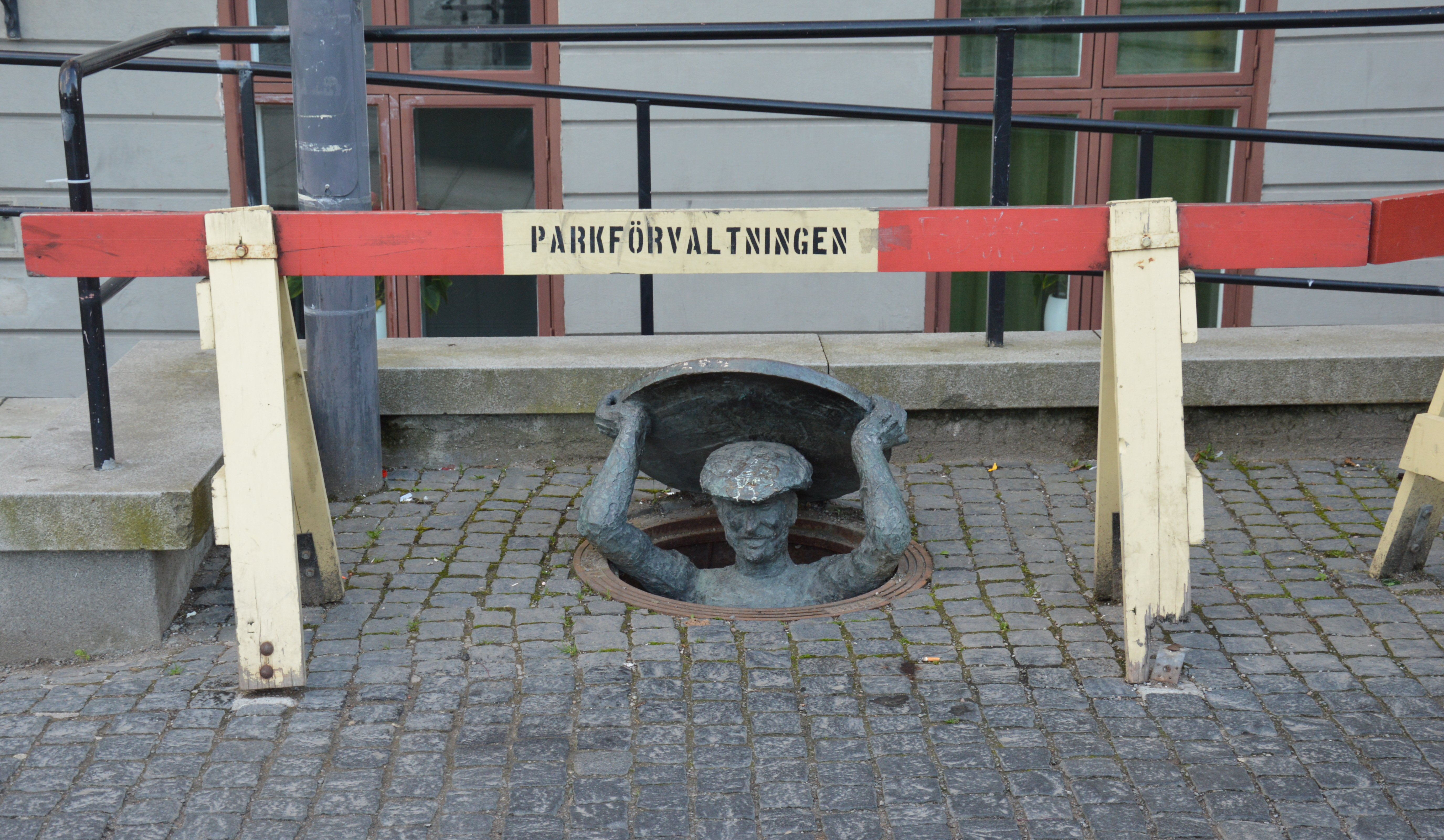 Kunstwerk am Slussen